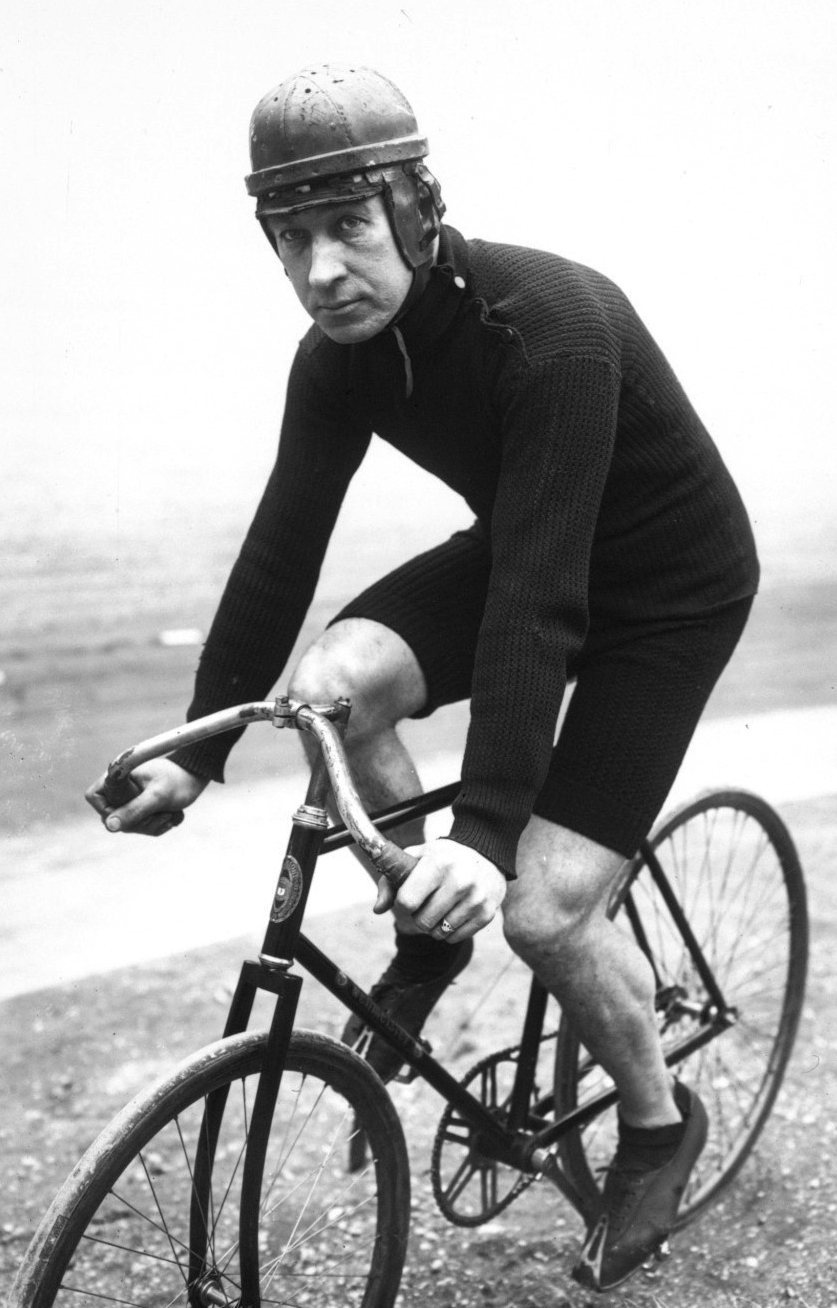 Nat Butler [cycliste] : [photographie de presse] / [Agence Rol]